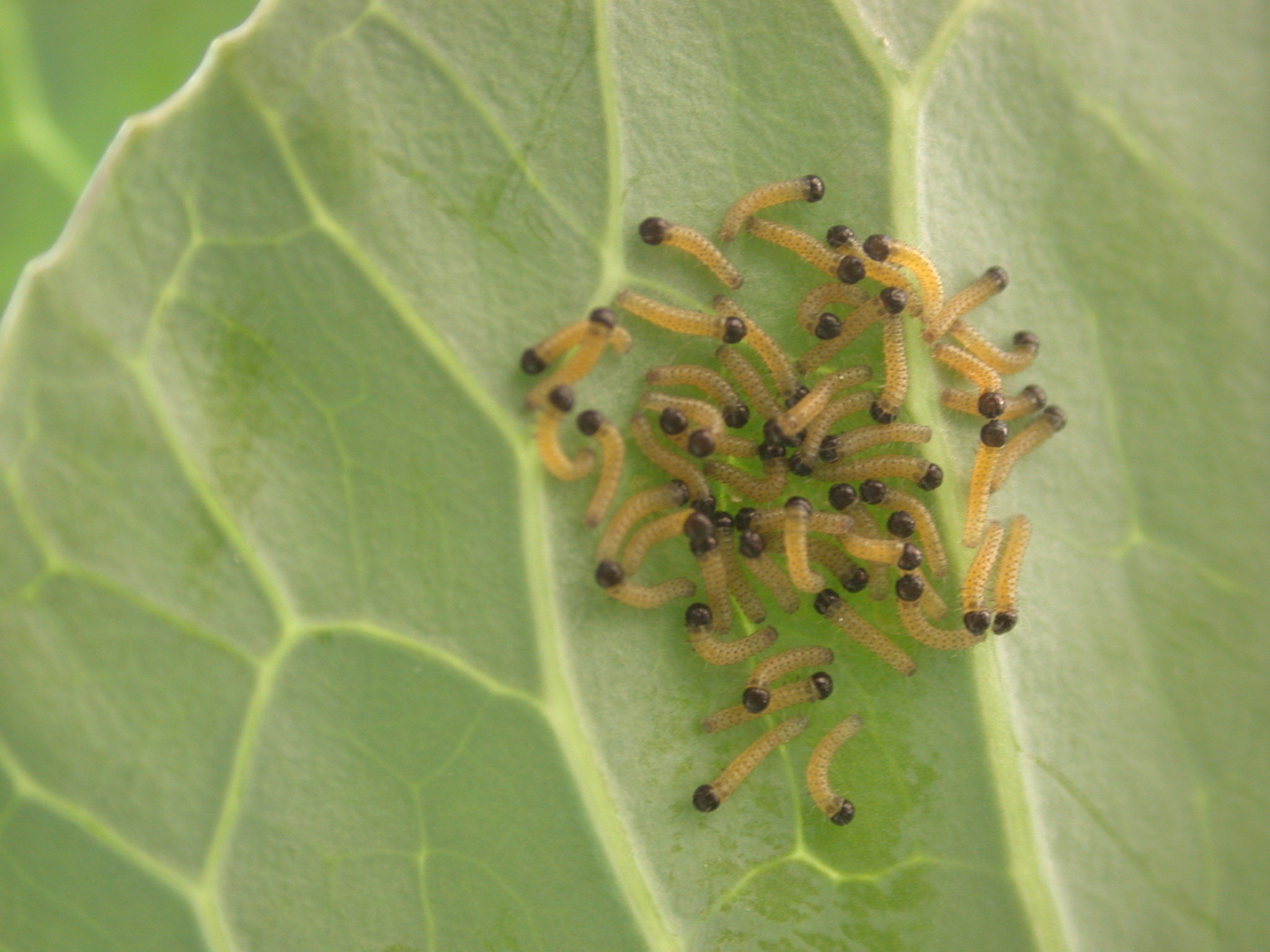 tra-la eclosâo do ovo, com um dia de vida